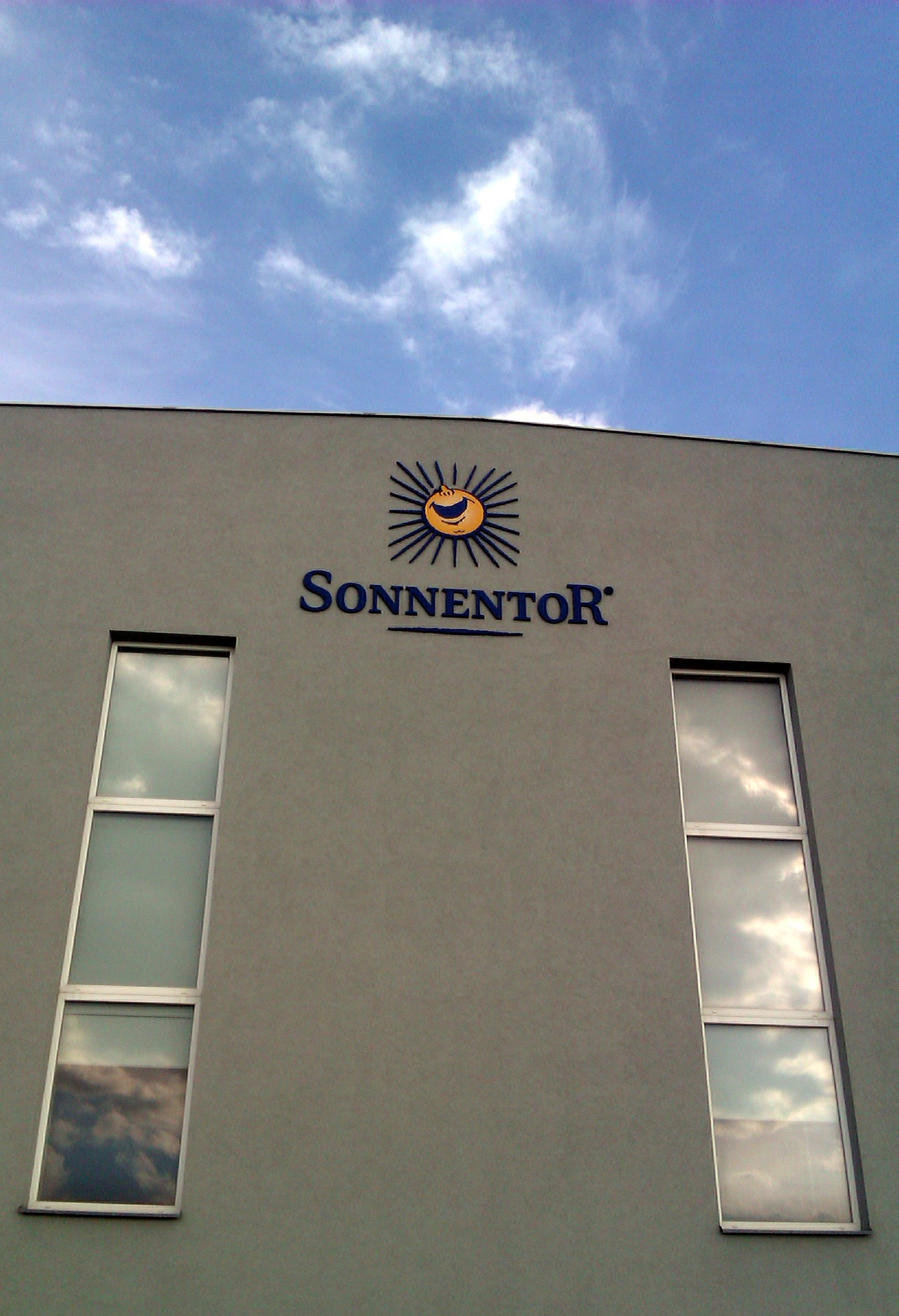 sonnentor